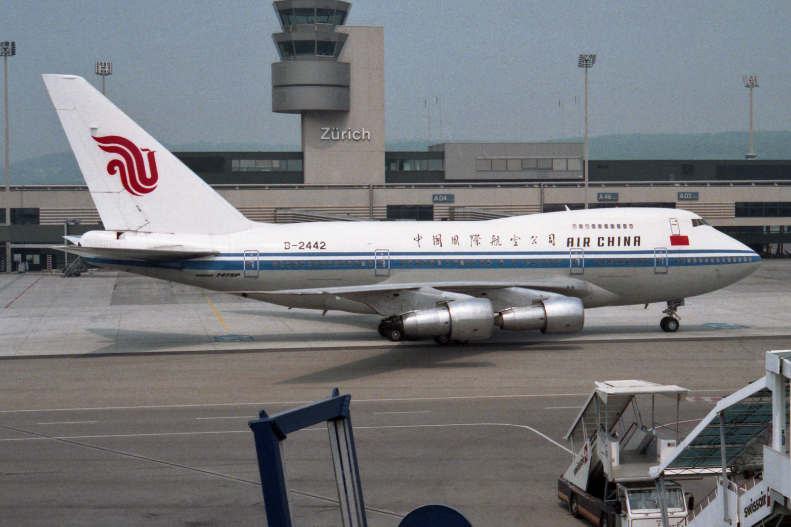 Zürich (- Kloten) (ZRH / LSZH) Switzerland 6.1992